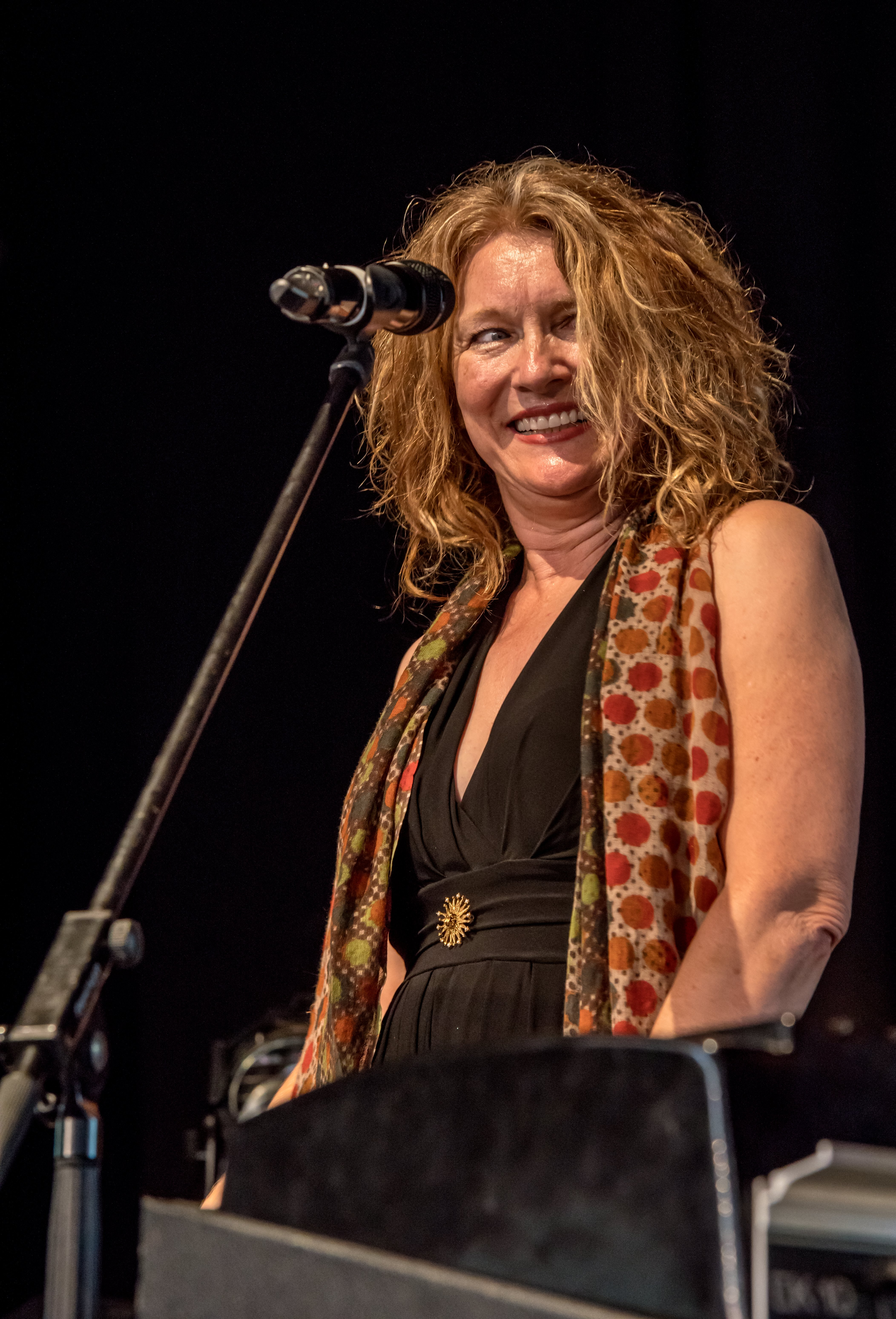 Bilder vom Zelt Musik Festival 2017 in Freiburg im Breisgau Die Klassikmatinee "Von Bach bis Gerschwin und Piazolla"